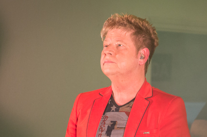 Foto: Douglas Teixeira/Agência Briosa